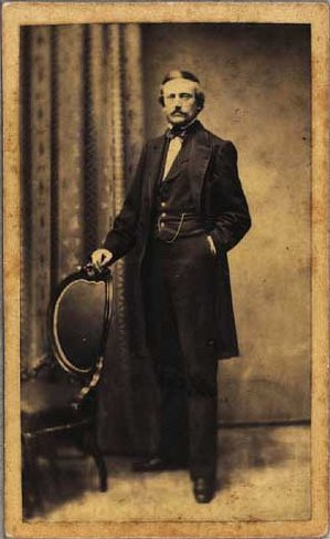 Christian Andreas Selchau (1825-1893), dansk godsejer